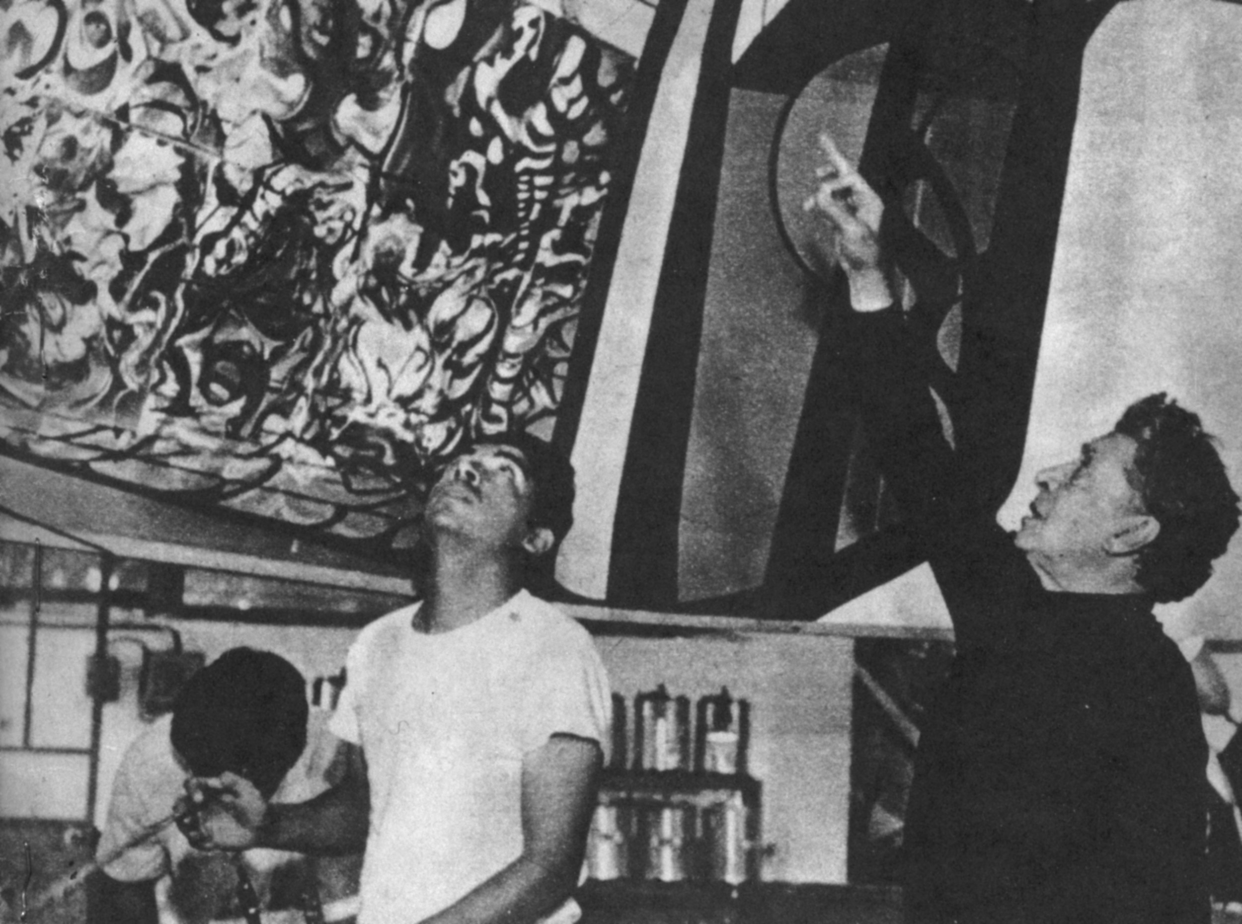 Ceniceros y Siqueiros